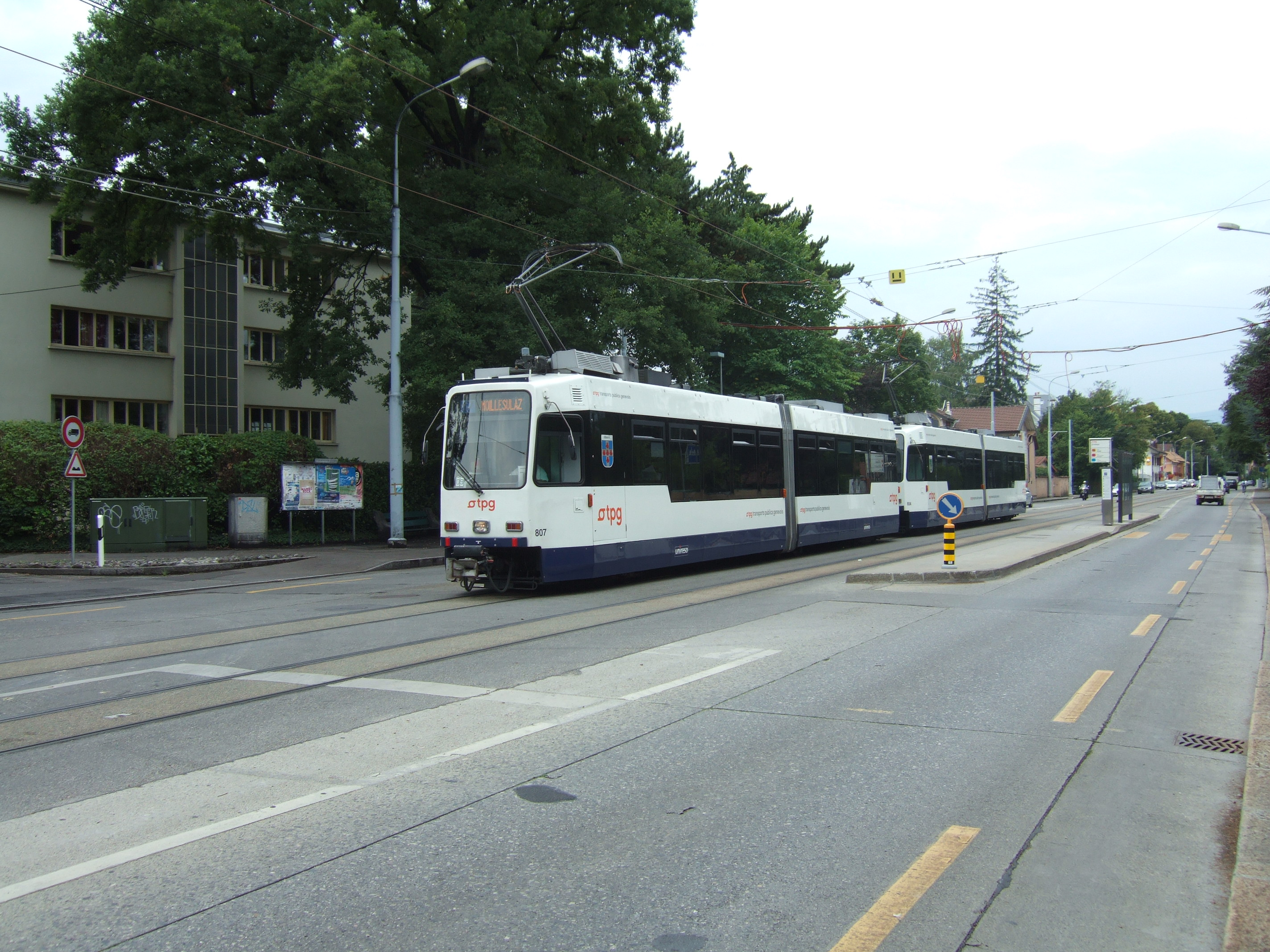 Photo. Trams aux Fils. Ligne 17 Double traction de DAV